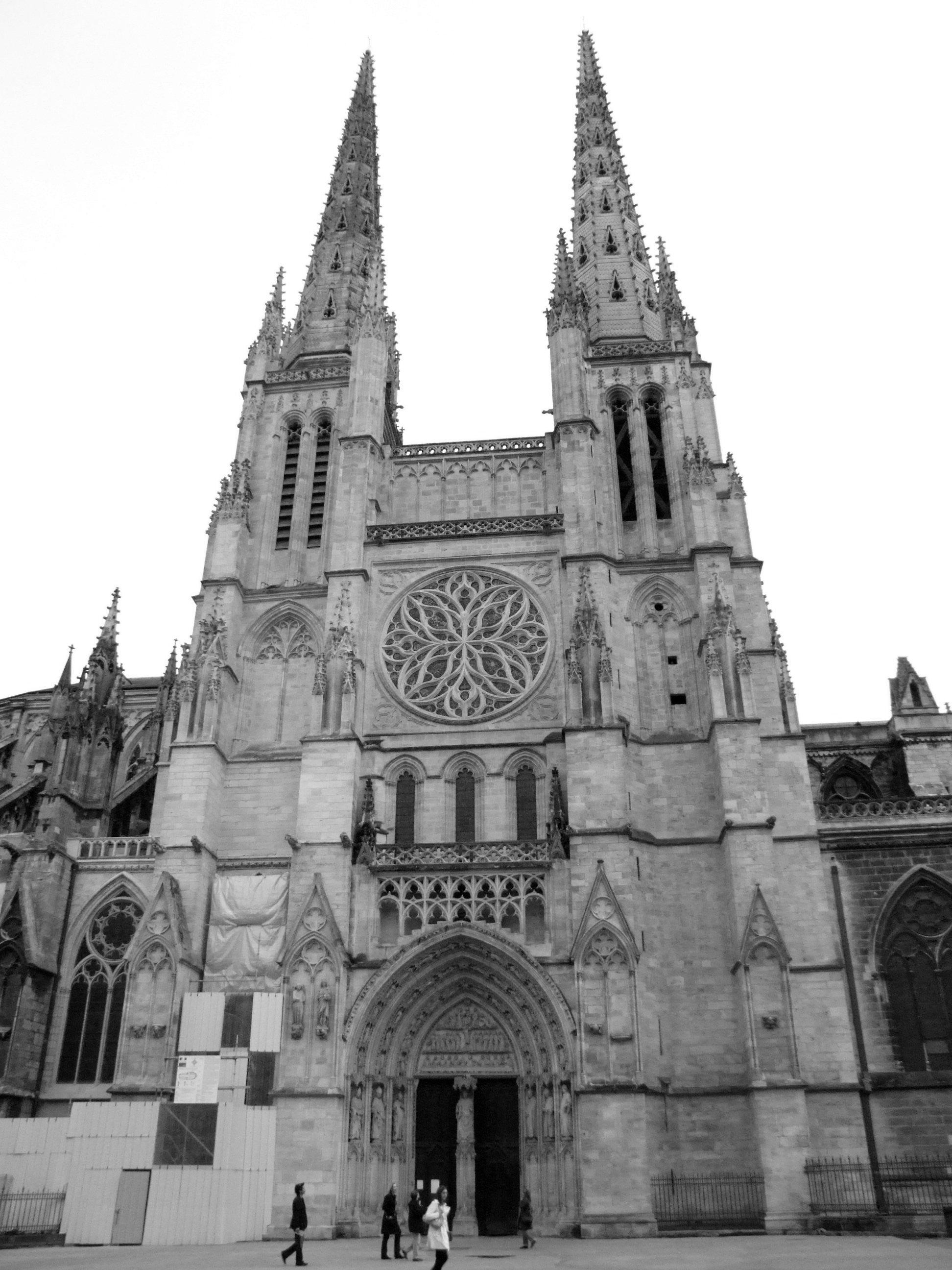 Bordeaux, Gironde, FRANCE